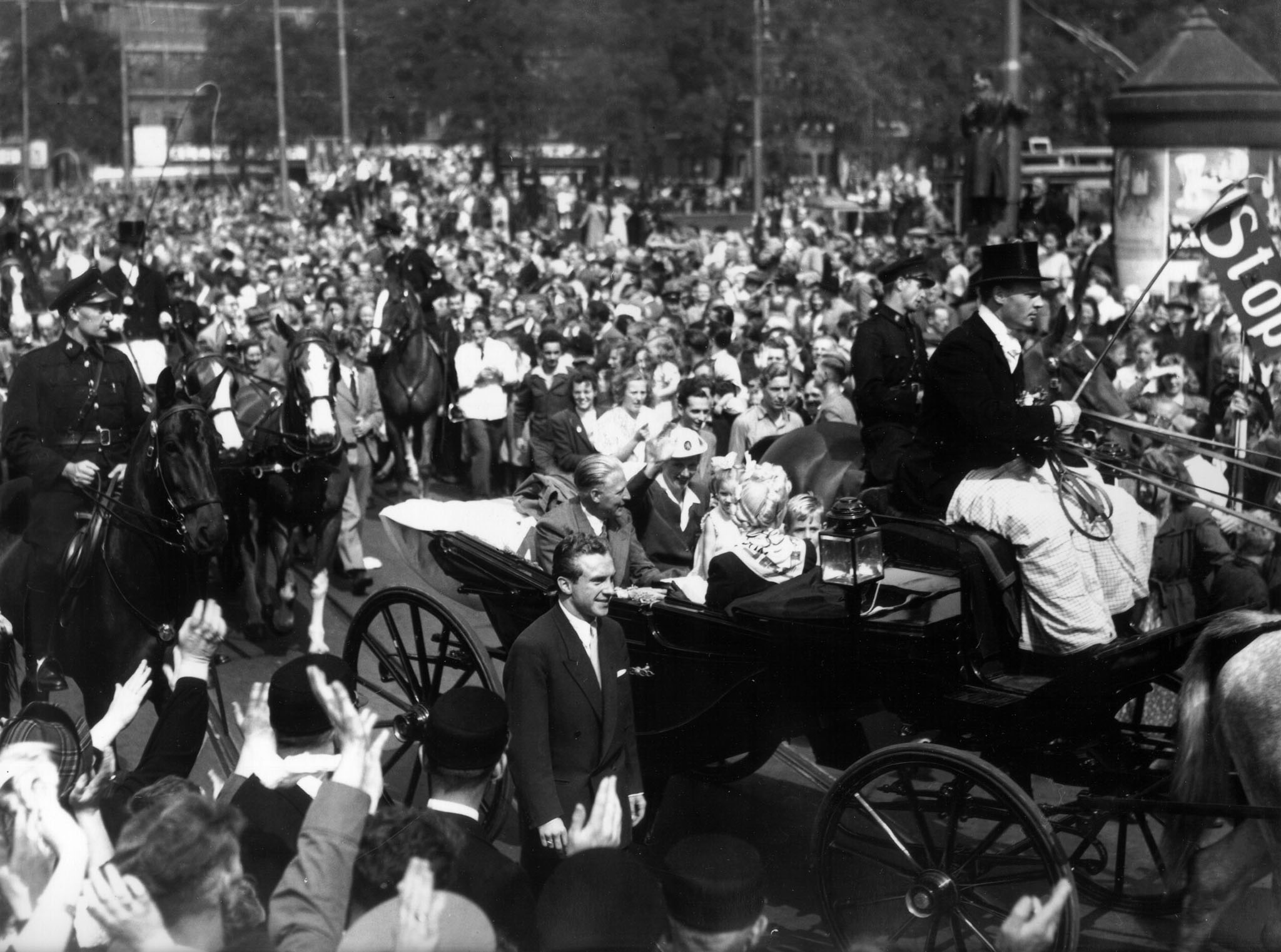 Reportage intocht Fanny Blankers-Koen, rijtoer door de stad, Amsterdam, 10 augustus 1948 Foto Ben van Meerendonk / AHF, collectie IISG, Amsterdam